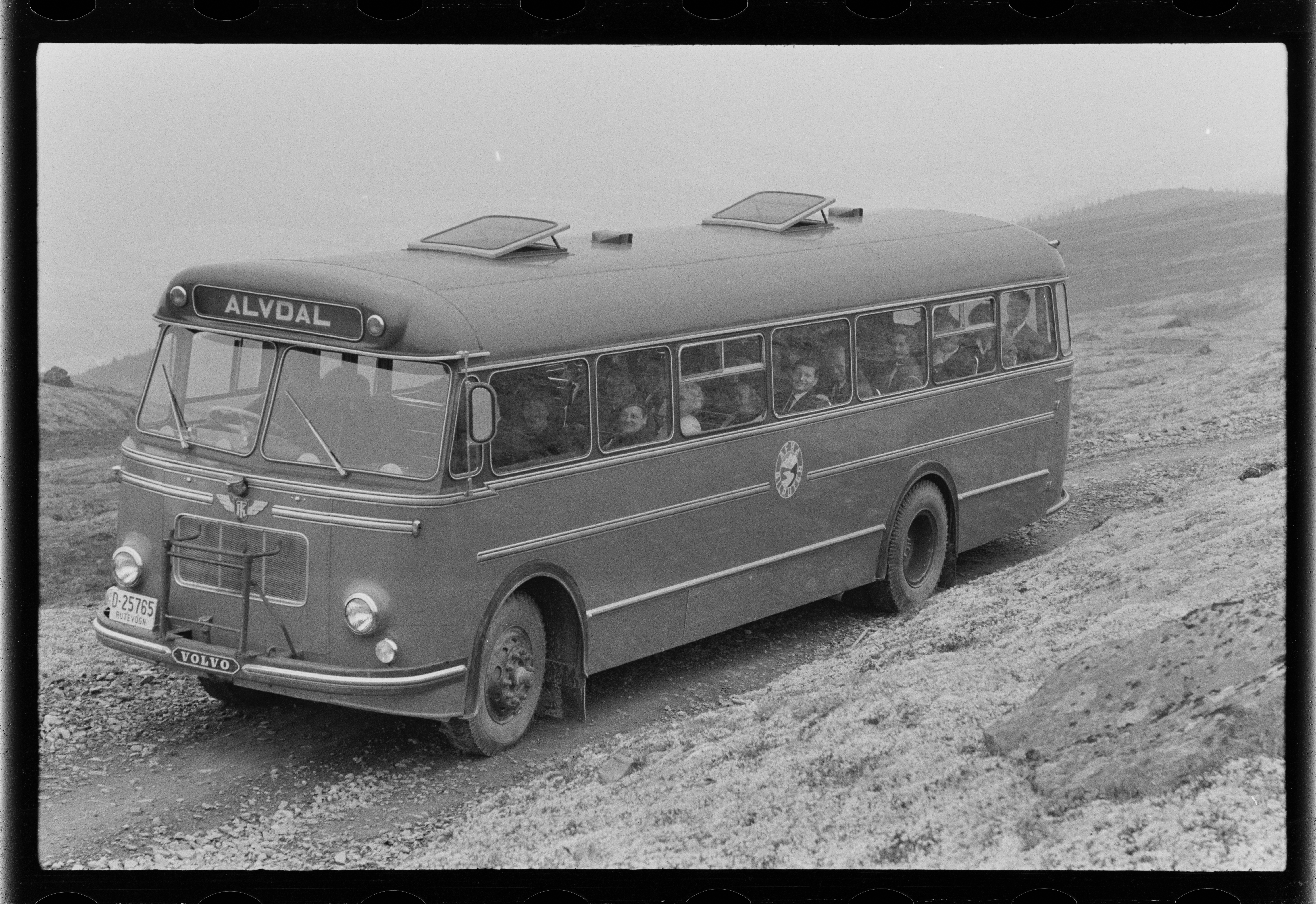 Bildet er hentet fra Arkivverket. Foto tatt i forbindelse med reportasje om den norske filmen Freske fraspark fra 1963. Manus var ved Kjell Aukrust og Bjørn Breigutu. Regi ved Bjørn Breigutu. Kjell Aukrust, Leif Juster, Turid Caldwell, Alfhild Hovdan, Per Bistrup, Lalla Carlsen Arkivinstitusjon : Riksarkivet Arkivnavn : Billedbladet NÅ Sted : Norge, Hedmark, Alvdal, Emneord: Film, Filminnspilling, Buss Avbildet